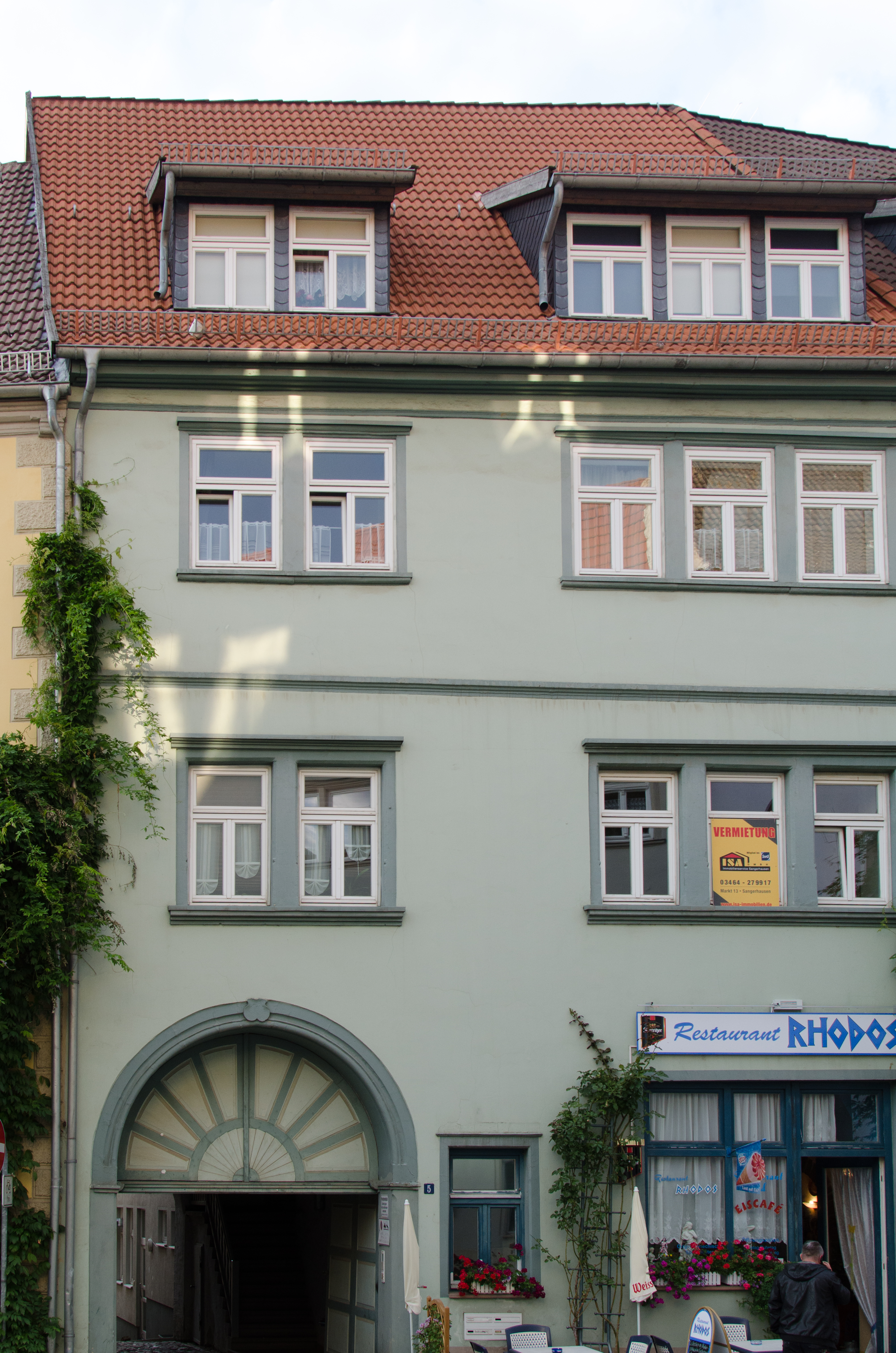 Sangerhausen, Kornmarkt 5